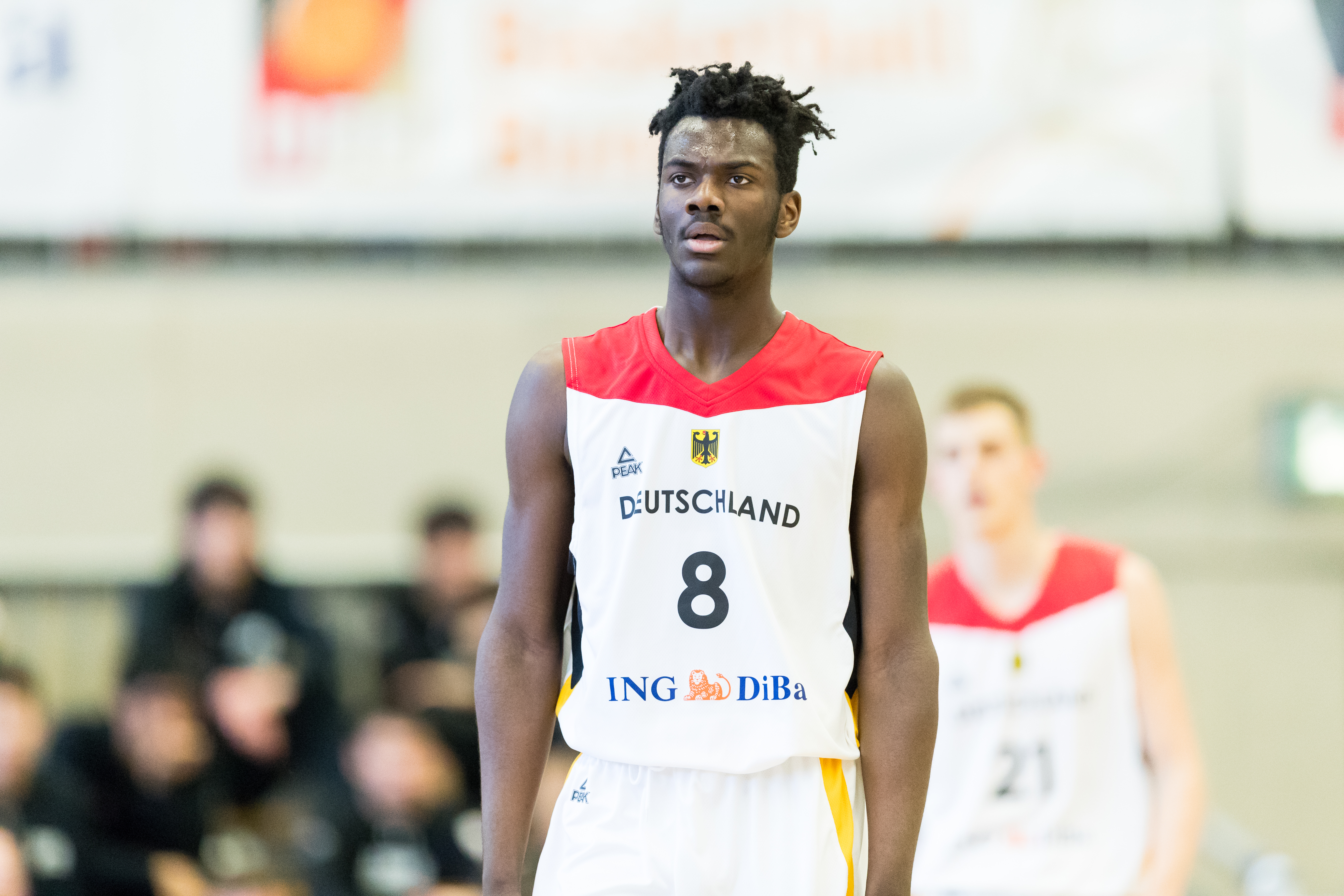 Australia vs Germany 66:88 during final Basketball Albert Schweitzer Turnier at GBG Halle, Mannheim, Baden-Württemberg, Germany on 2018-04-07, Photo: Sven Mandel